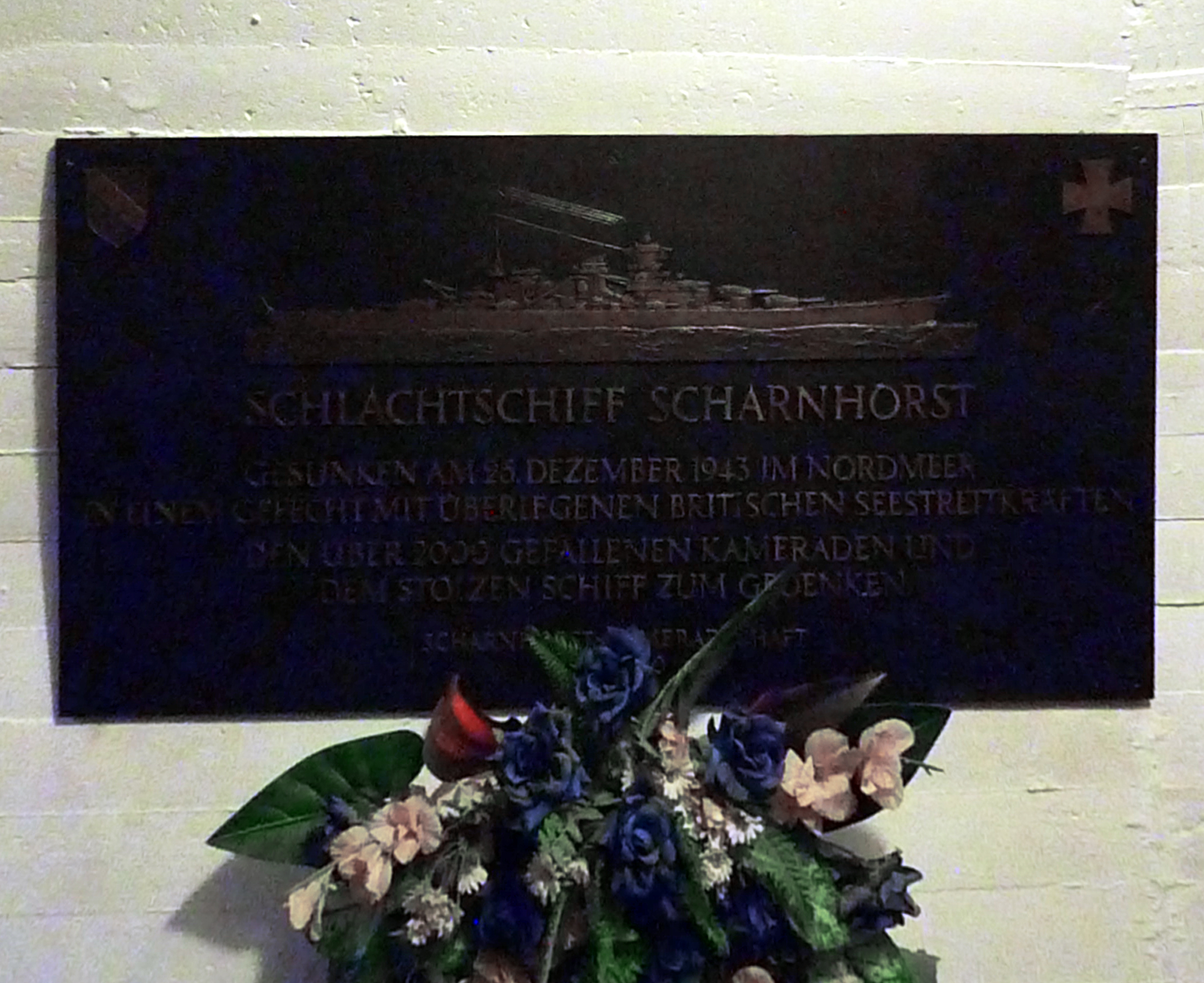 Gedenktafel für die Scharnhorst im Marineehrenmal Laboe